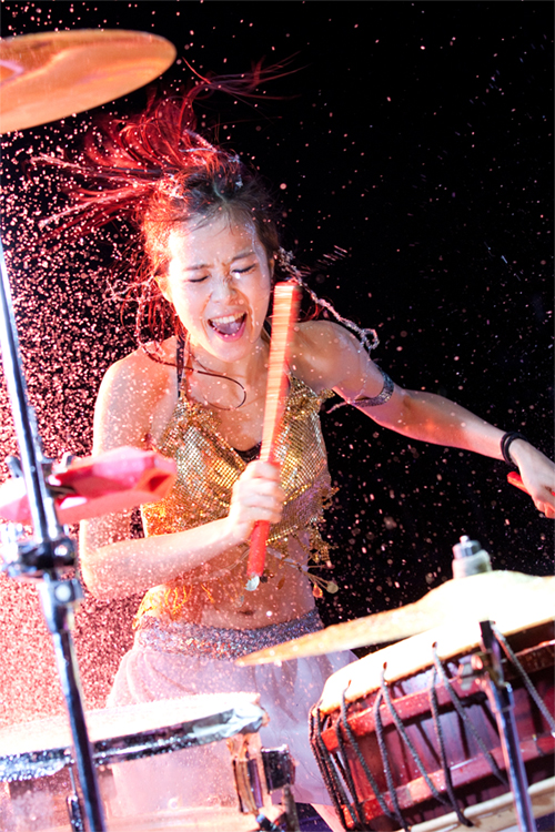 탈(THE TAL) 타악, 한국무용, 비보잉, 태권도가 조화를 이룬 공연으로 ‘아리랑’과 ‘태권도’의 앙상블과 완성도를 보여주는 넌버벌 퍼포먼스이다.